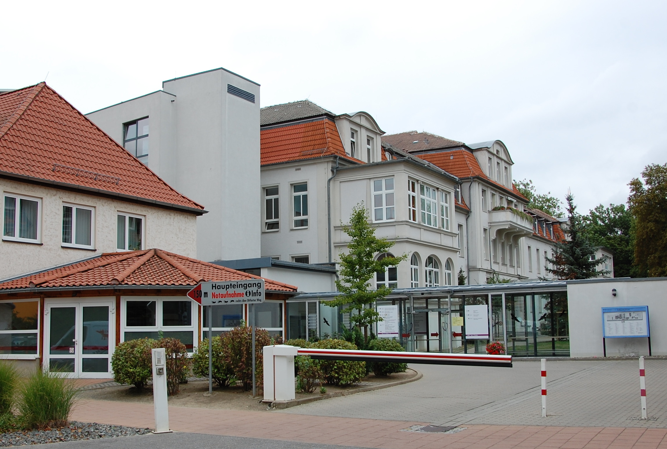 Harzklinikum Quedlinburg Altbau